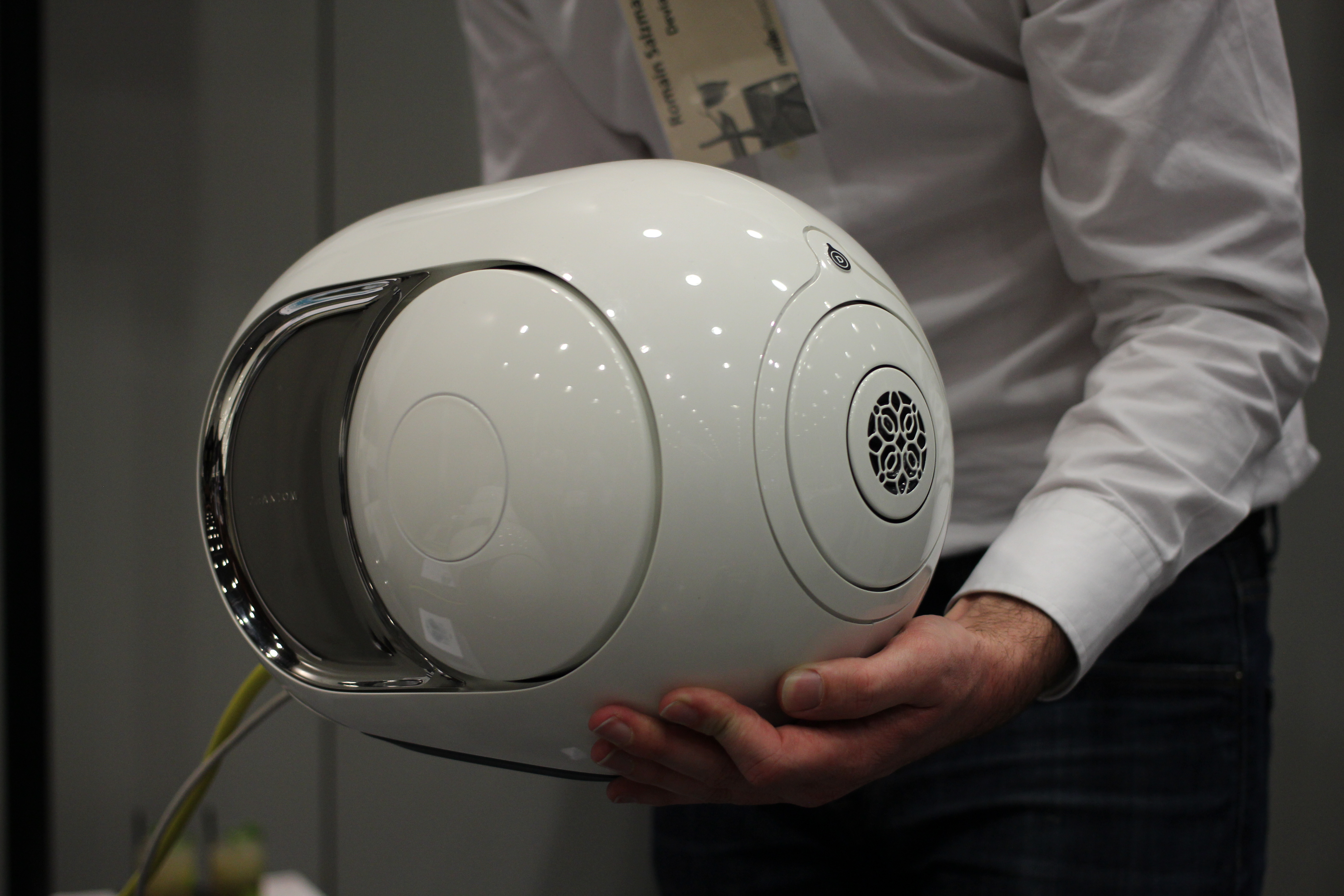 Devialet Phantom speaker